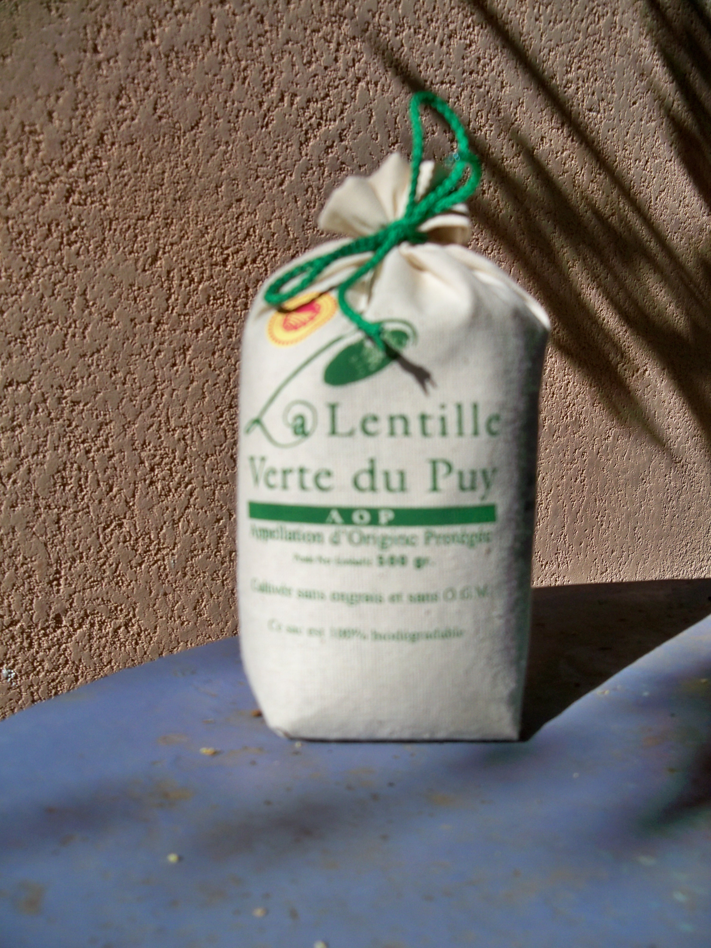 Sachet de lentille verte du Puy